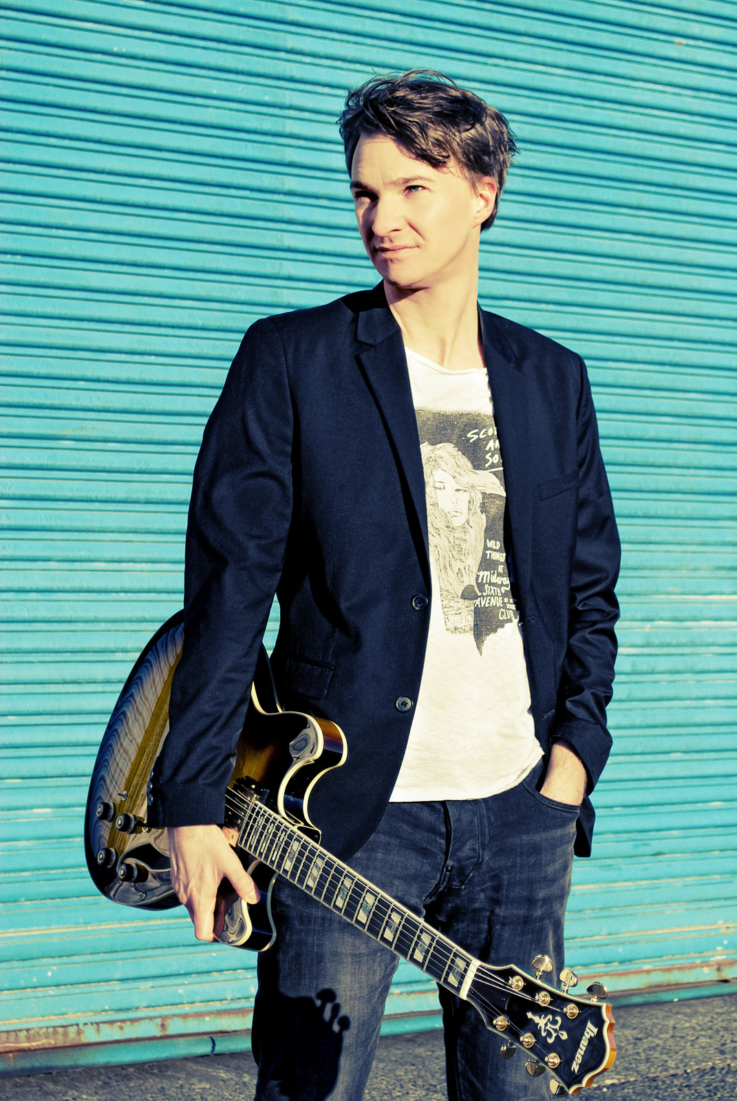 Max Frankl, Red Hook, Brooklyn N.Y. 2013